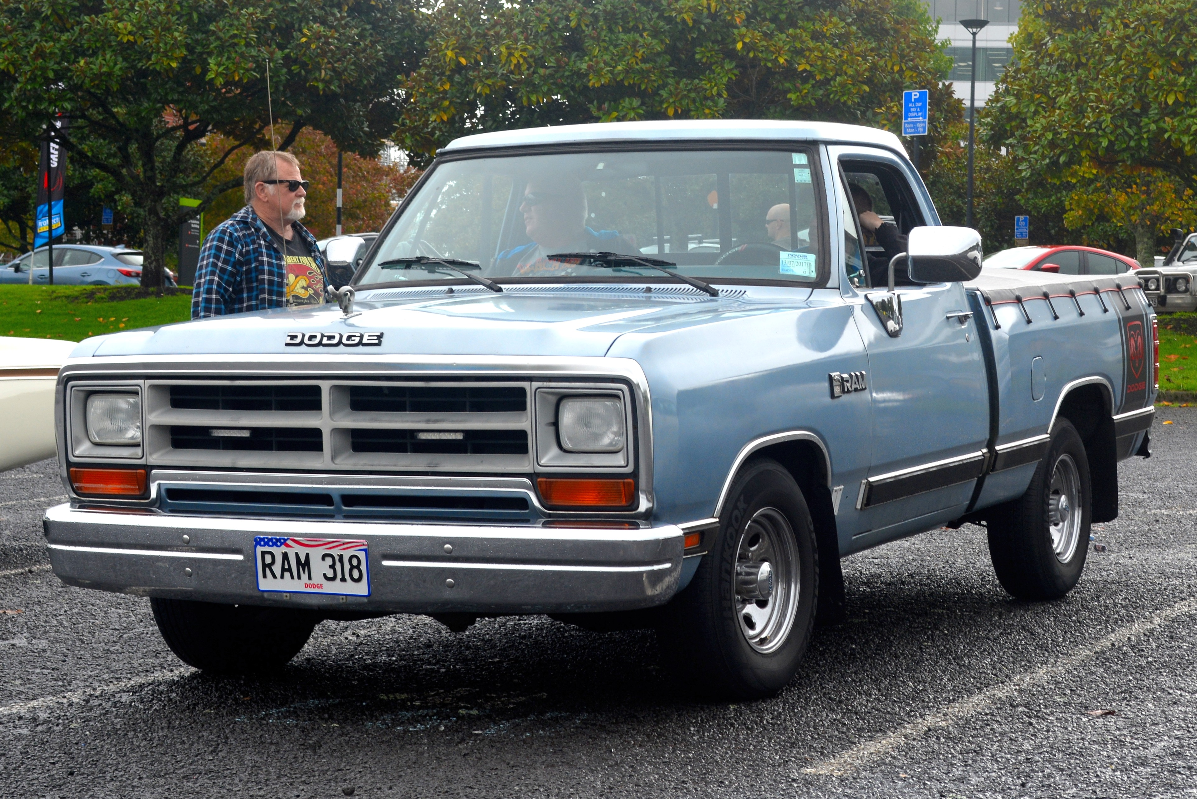 Auckland,New Zealand